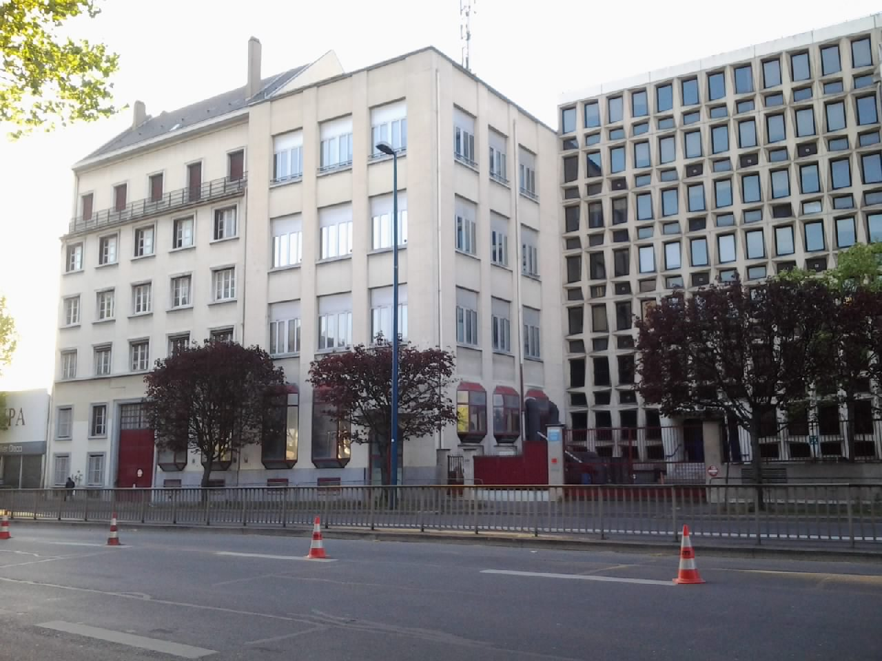 Central téléphonique Villette - Pantin (93), 231 avenue Jean Lolive - Avril 2014.